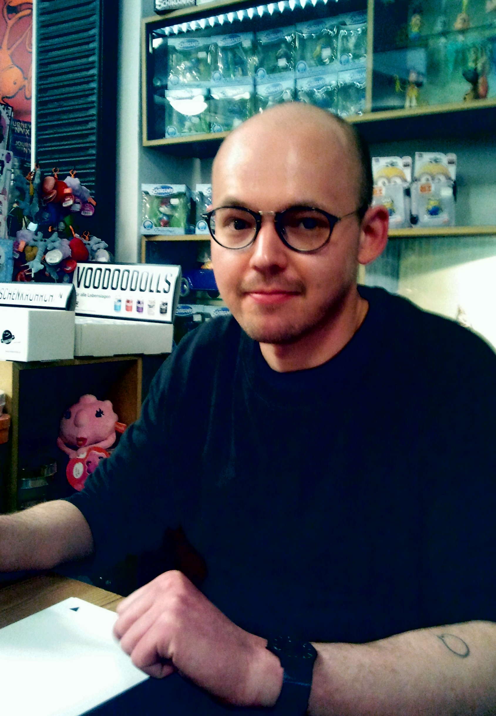 Benedikt Beck bei einer Signierstunde im Nürnberger Comicladen „Ultra Comix“, Mai 2014